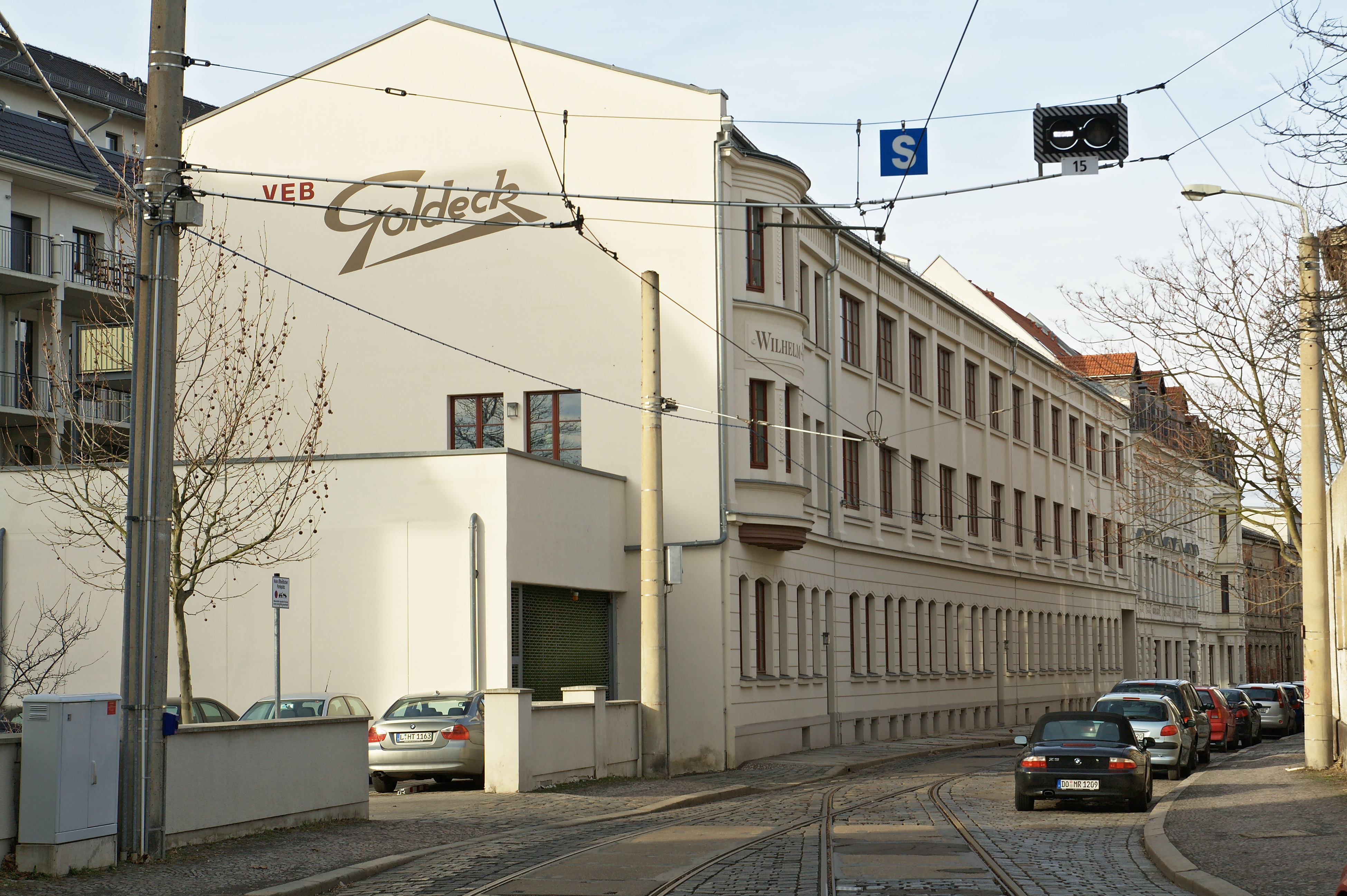 Ehemalige Schokoladenfabrik "Wilhelm Felsche", Leipzig 2011.